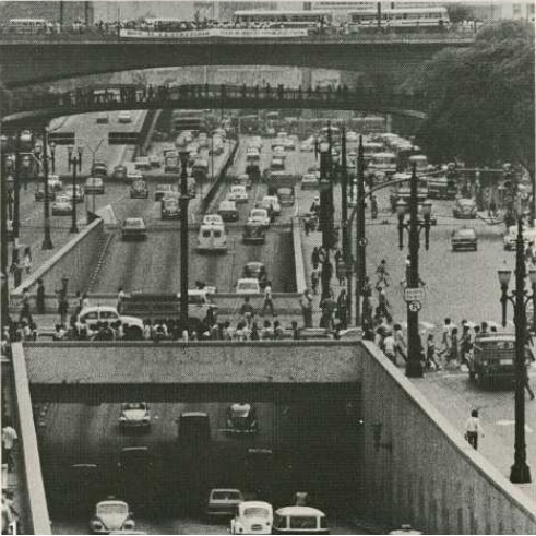 Vista da Passagem Inferior chamada popularmente de "Buraco do Ademar". Ao fundo o Viaduto do Chá.